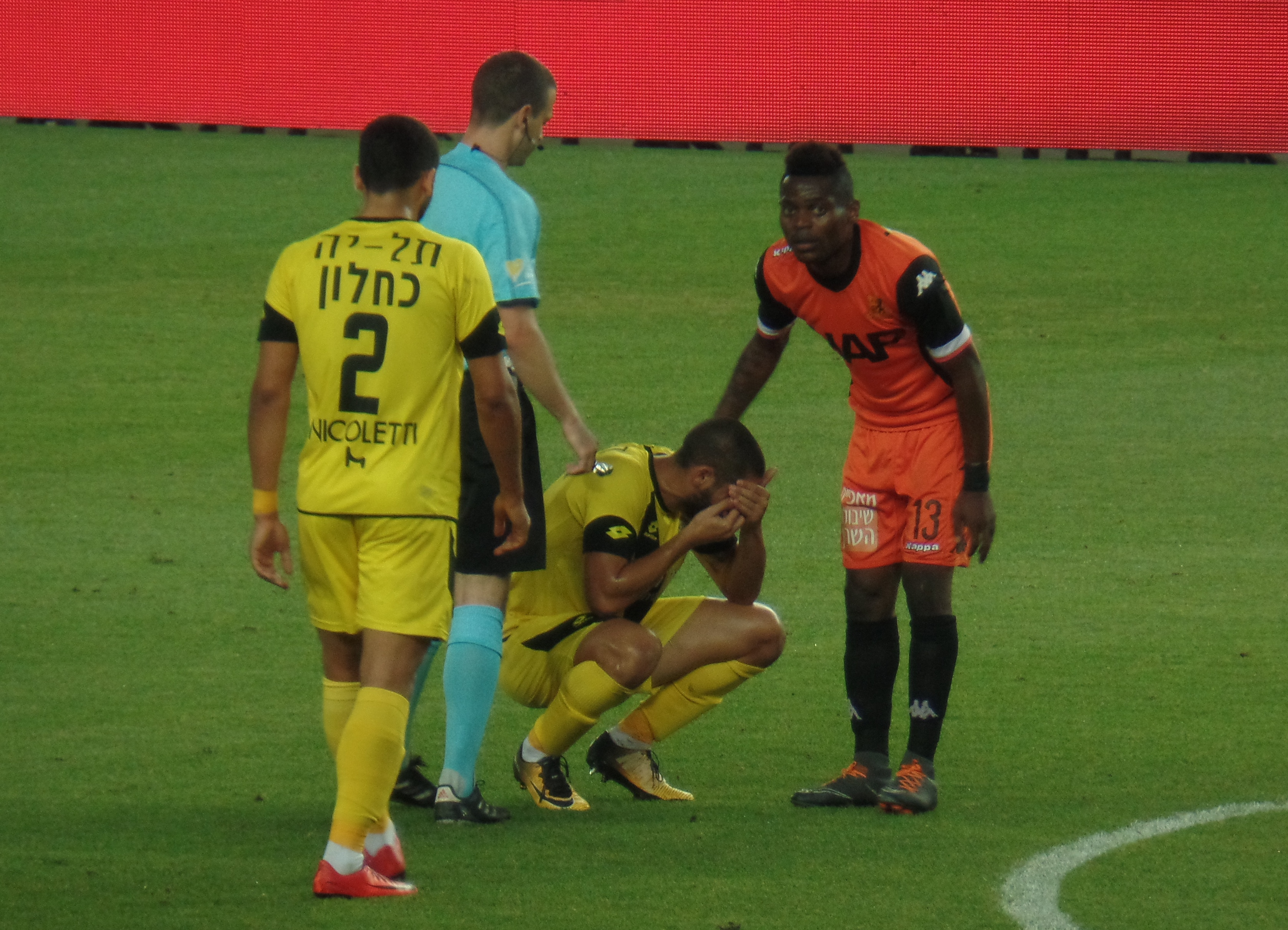 מאוויס צ'יבוטה במדי בני-יהודה, 2018